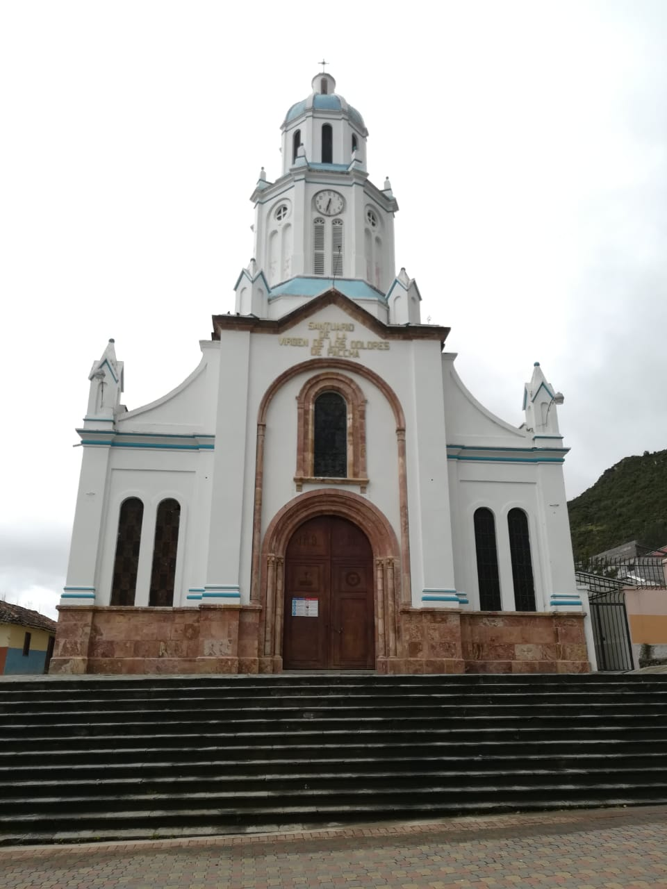 Santuario en honor a la Virgen de los Dolores; patrona de Paccha